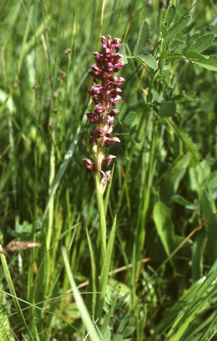 Wanzen-Knabenkraut (Anacamptis coriophora, Syn.: Orchis coriophora), Orchideen (Orchidaceae) - Österreich/Austria/Autriche: Burgenland, Seewinkel, Illmitz